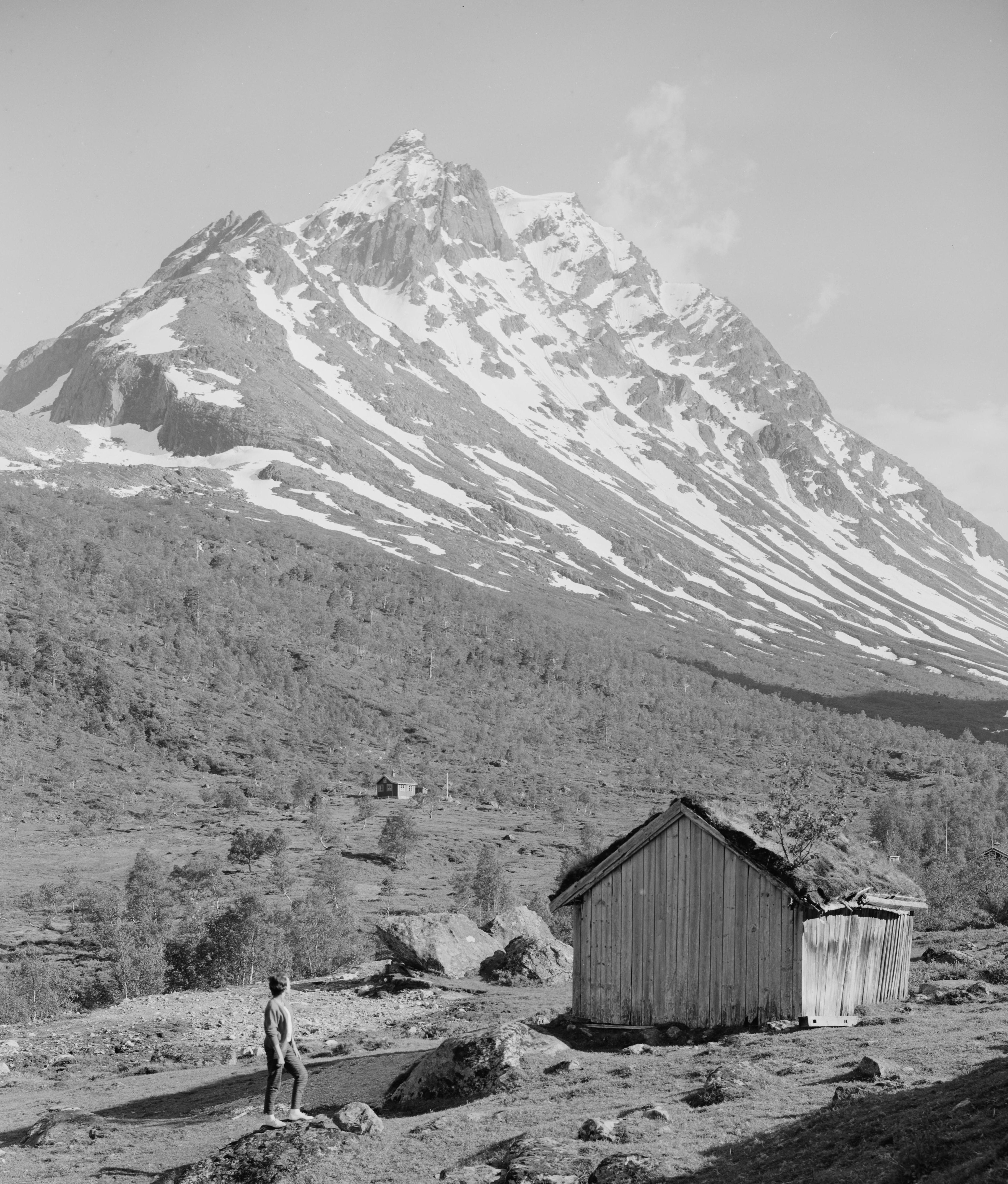 Bildet er hentet fra Nasjonalbibliotekets bildesamling. Anmerkninger til bildet var: fotograf: Å.M. Venjesdalen, Rauma, Møre og Romsdal